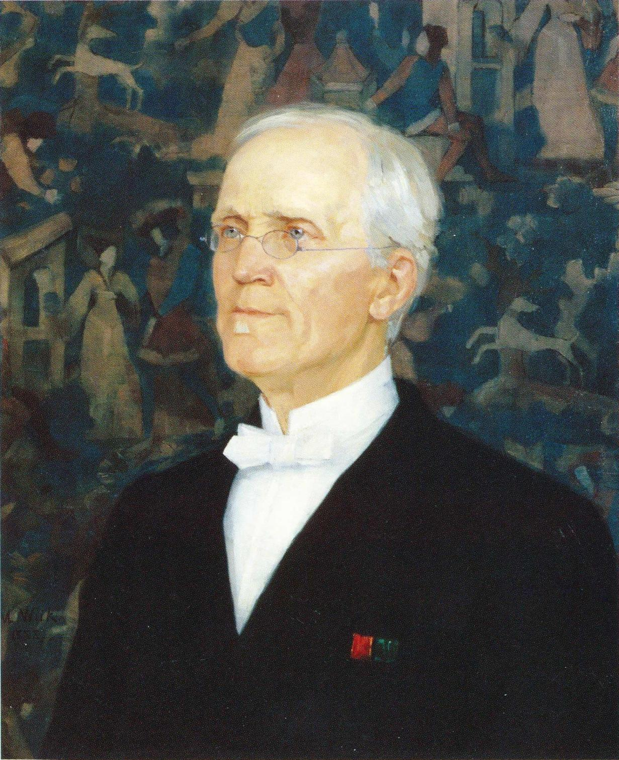 Suomen Taideyhdistyksen intendentti Berndt Otto Schauman (1821–1895).